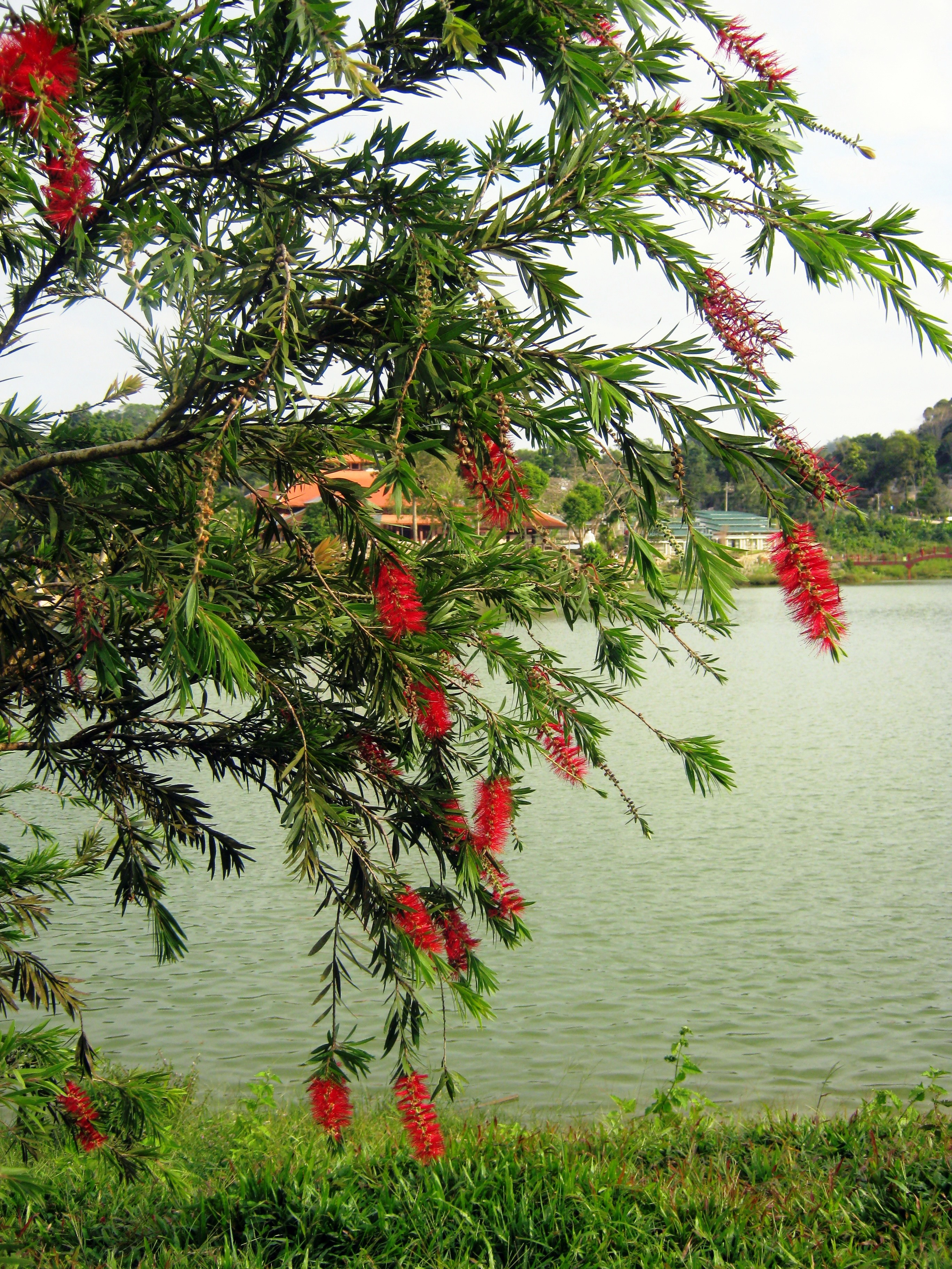 Tràm liễu bên hồ Thủy Liêm trên đỉnh núi Cấm (An Giang, Việt Nam)